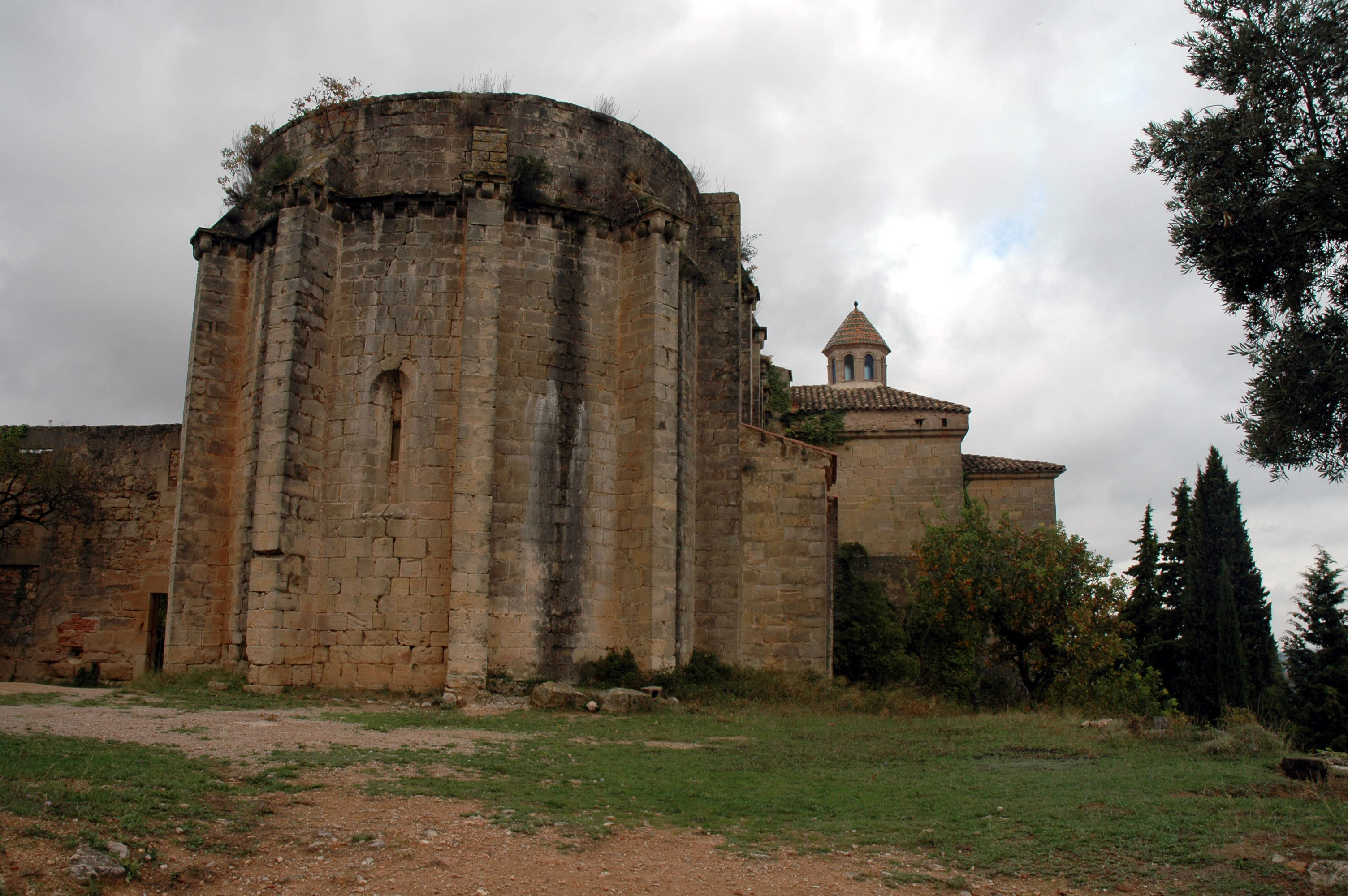 Església del convent de Santa Maria dels Àngels, d'Horta de Sant Joan. L'absis. Any 1998.